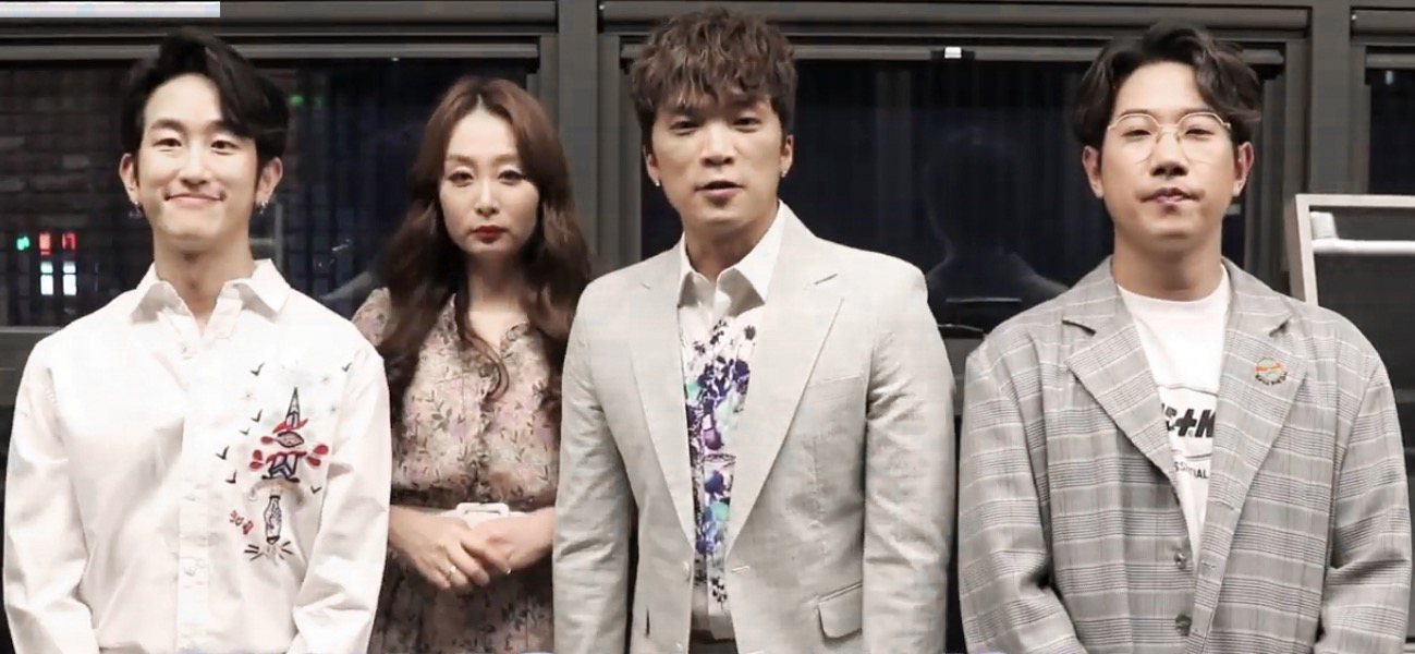 몽니 한 여름 밤의 Dream pop 2019 콘서트 인사영상 MONNI One summer night dream pop 2019 Concert - 티켓 예매 ▶ 공연 일시 ▶ 2019. 08. 31(토) 19:00 공연 장소 ▶ 마포아트센터 아트홀 맥 - 몽니 SNS 페이지 :: 몽니 홈페이지 몽니 페이스북 몽니 트위터 몽니 인스타그램